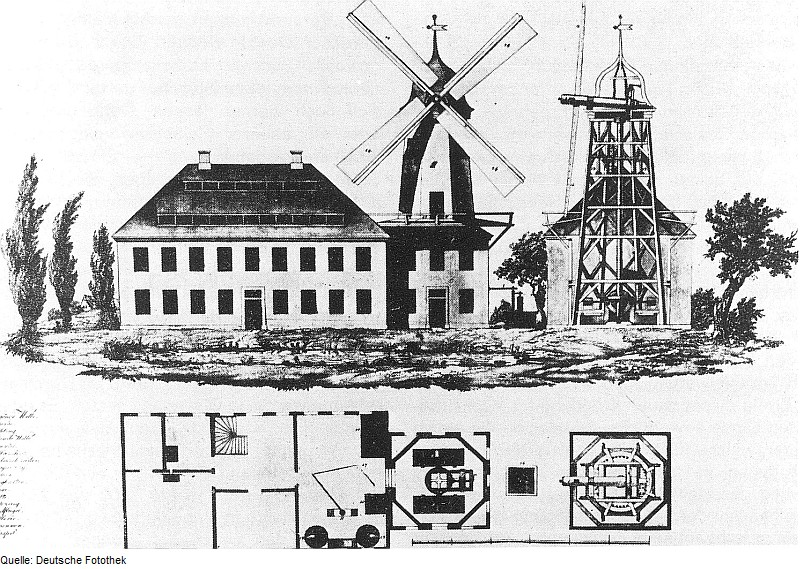 Original image description from the Deutsche Fotothek Leipzig-Stötteritz. Papiermühle Stötteritz, Grundriß, Schnitt, Aufriß, 1801